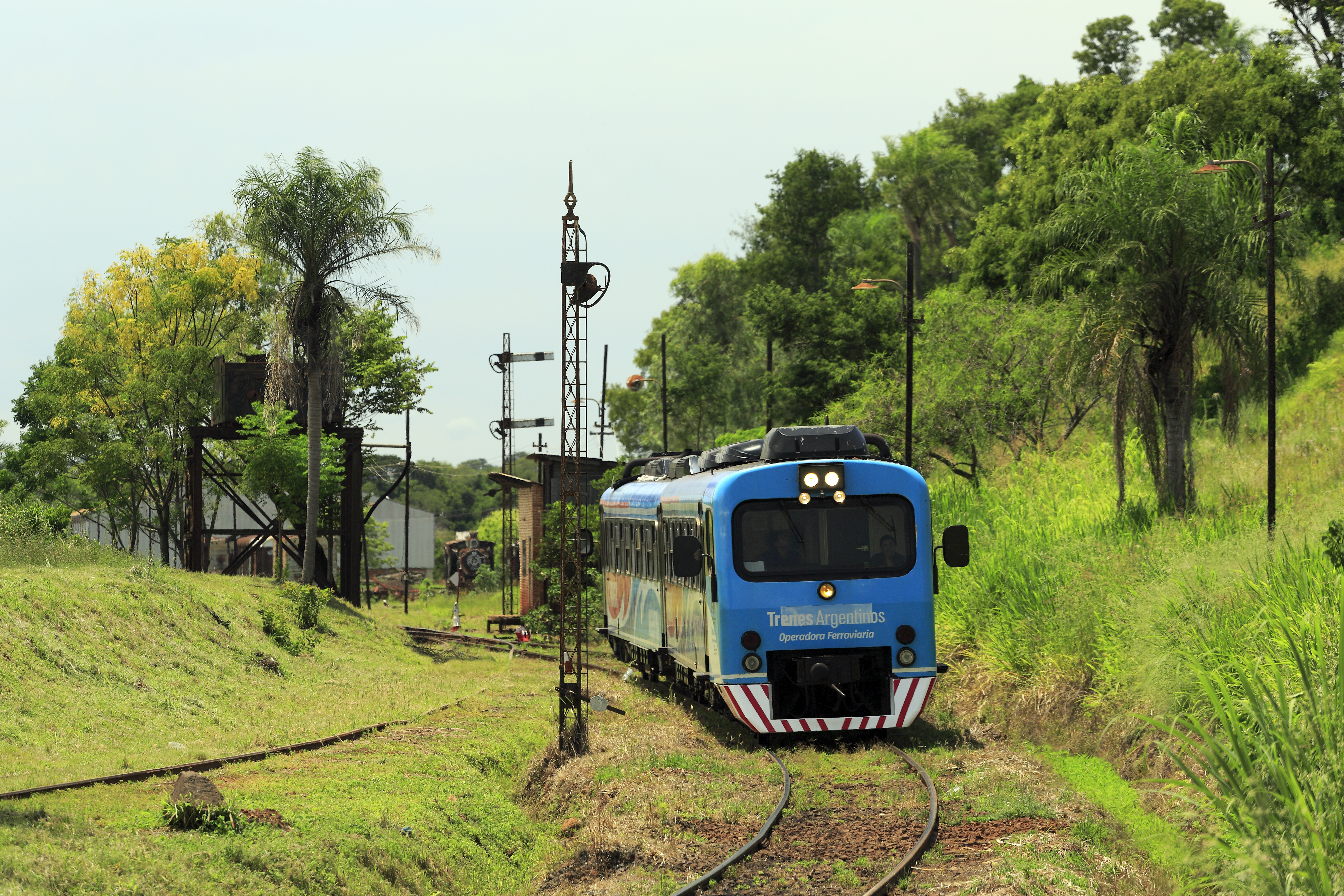 Personenzug Encarnación–Posadas beim Verlassen des Bahnhofs Encarnación auf Höhe des zum Aufnahmezeitpunktes schon länger ungültigen Einfahrsignals. Solange nur diese eine Zugeinhheit eingesetzt wird, sind Stellwerks- und Sicherungsanlagen auch nicht unbedingt notwendig.Die »Wadloper«-Triebwageneinheit wurde mit einigen anderen in den Niederlanden gekauft.